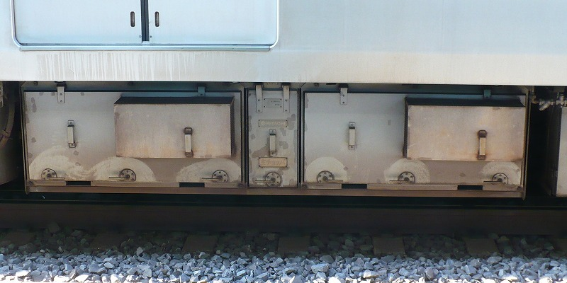 地下鉄03けき機器